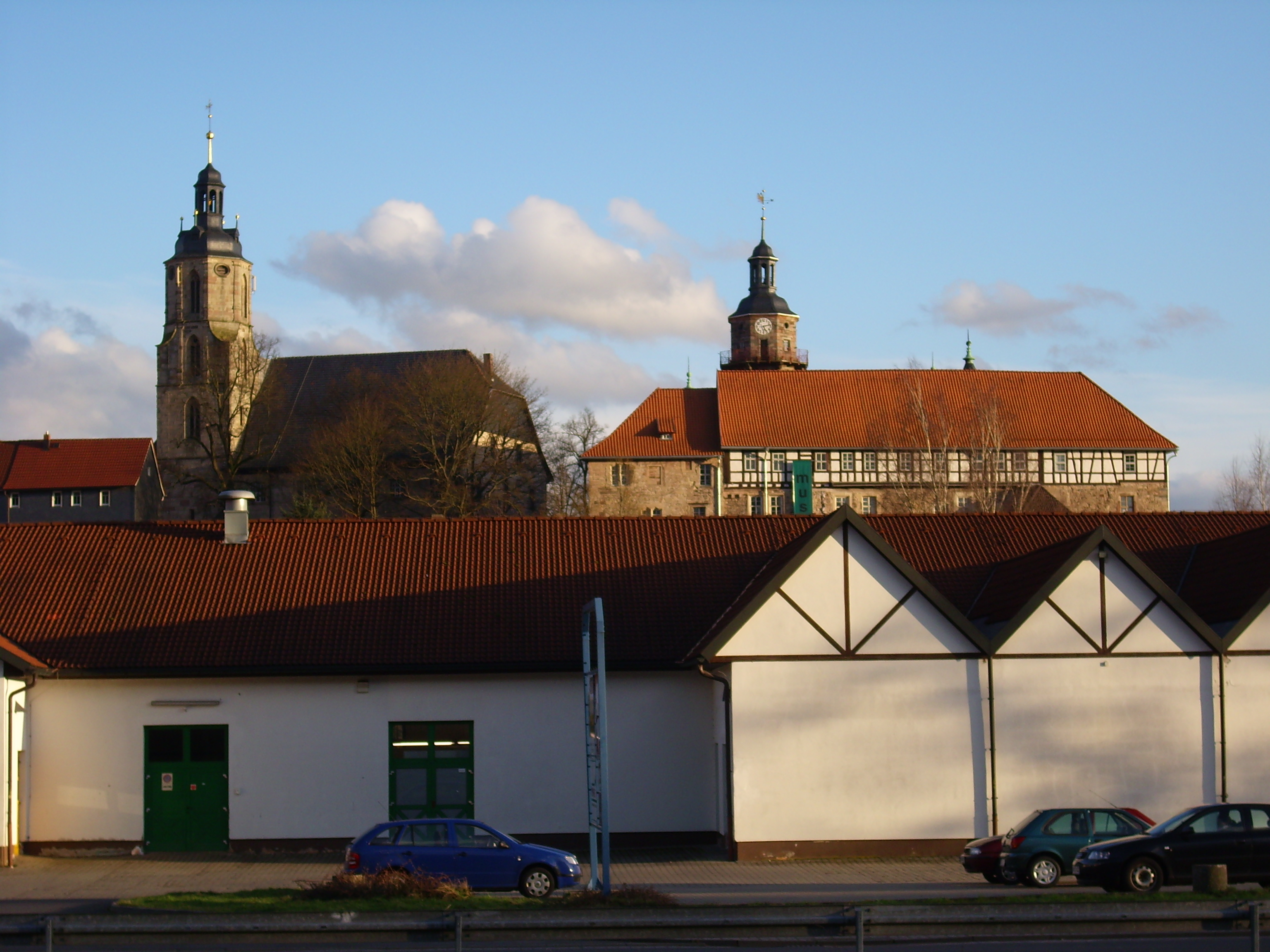 Die Kirche St. Johannis und die Bertholdsburg zu Schleusingen vom Langen Teich aus.